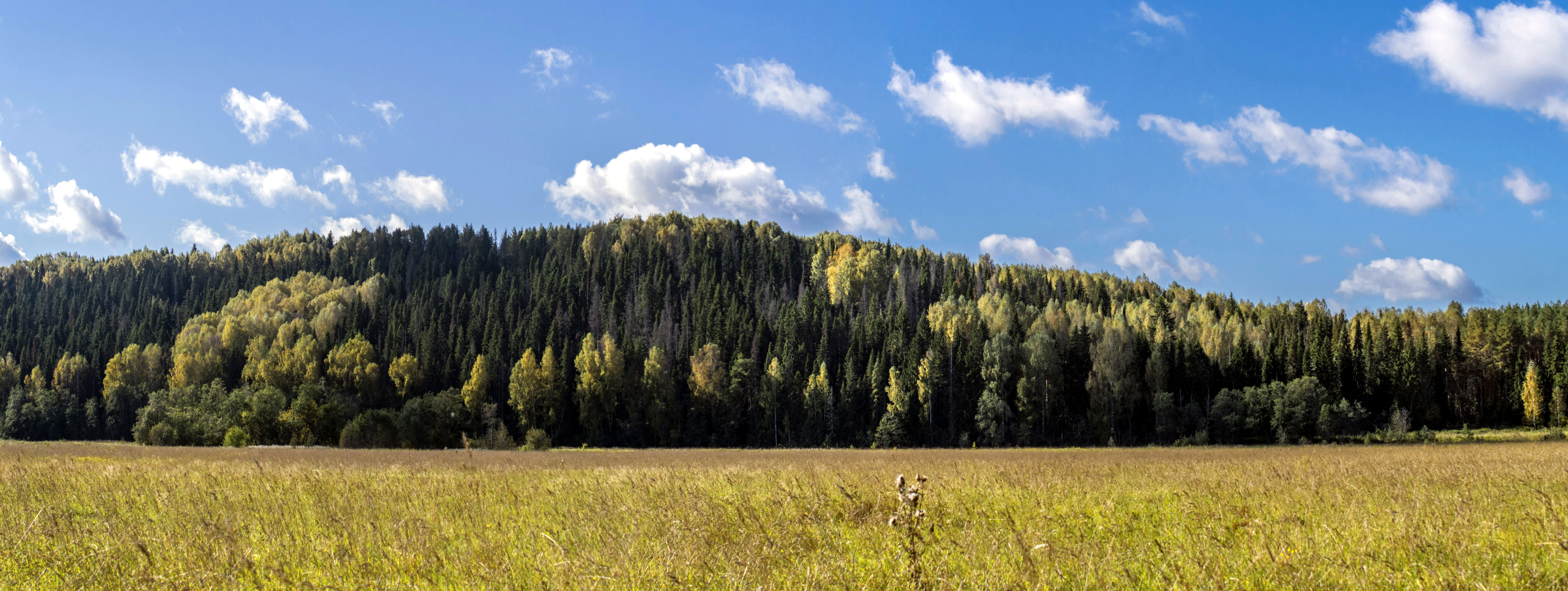 Береснятский ботанико-геологический комплекс: Находится на правом коренном берегу р. Немда в 3 км от д. Фокино у бывших деревень Береснята и Буржата, Советский район, Кировская область This image is related to the protected area of Russia number 4310236